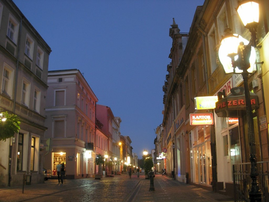 Ulica Długa w Bydgoszczy